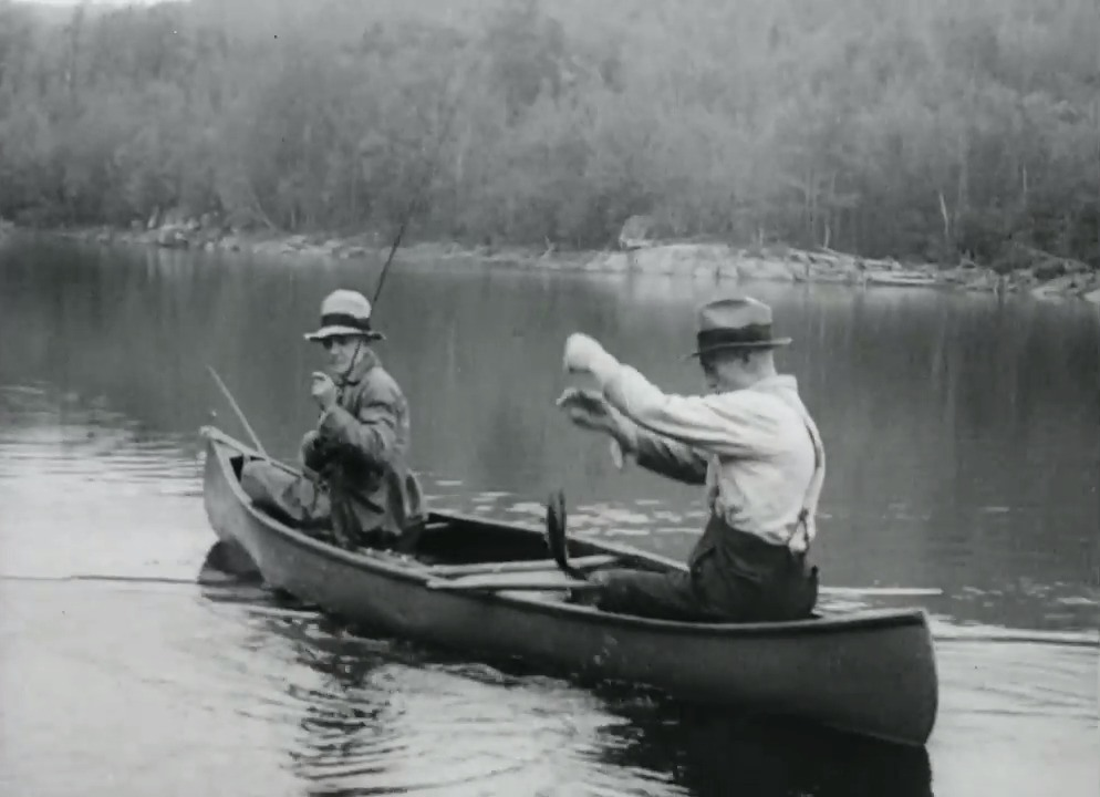 Pêche à la truite, rivière Pikauba, parc national des Laurentides, Québec